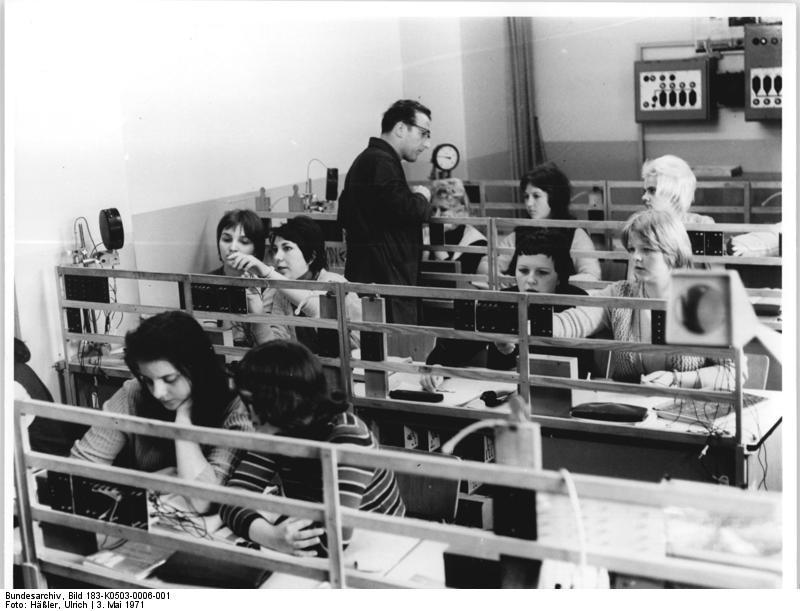 Blick in eine Berufsschulklasse Zentralbild Häßler 3.5.71-ch Bezirk Dresden: Zootechniker, Agrotechniker und Geflügelzüchter werden an der Betriebsberufsschule des VEG Pesterwitz ausgebildet. Während ihrer zwei- oder dreijährigen Ausbildung werden ihnen Kenntnisse in der BMSR-Technik vermittelt. Zu Ehren des VIII. Parteitages der SED wollen die Lehrkräfte und Schüler dieser Bildungseinrichtung die Unterrichtskabinette vervollständigen. Die Schüler von sechs Klassen werden neben der Facharbeiterprüfung auch das Abitur ablegen und danach ein Hoch- bzw. Fachschulstudium aufnehmen.